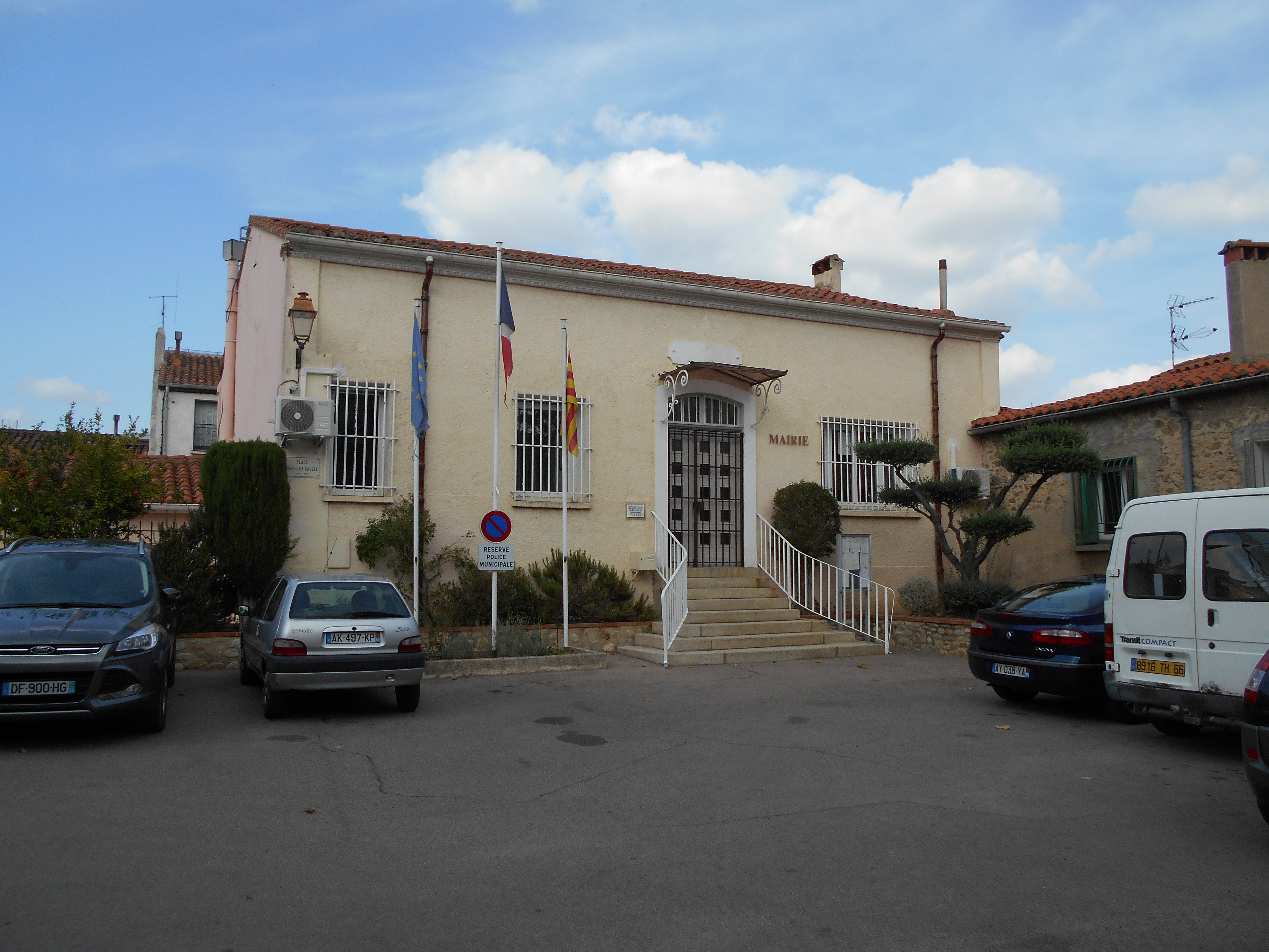 La Casa del Comú de Sant Genís de Fontanes